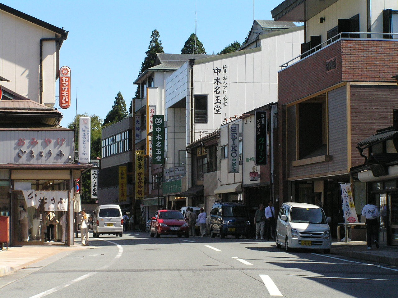 高野山町中心部